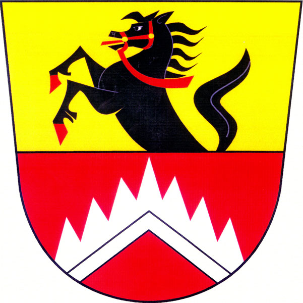 Znak obce Velenov